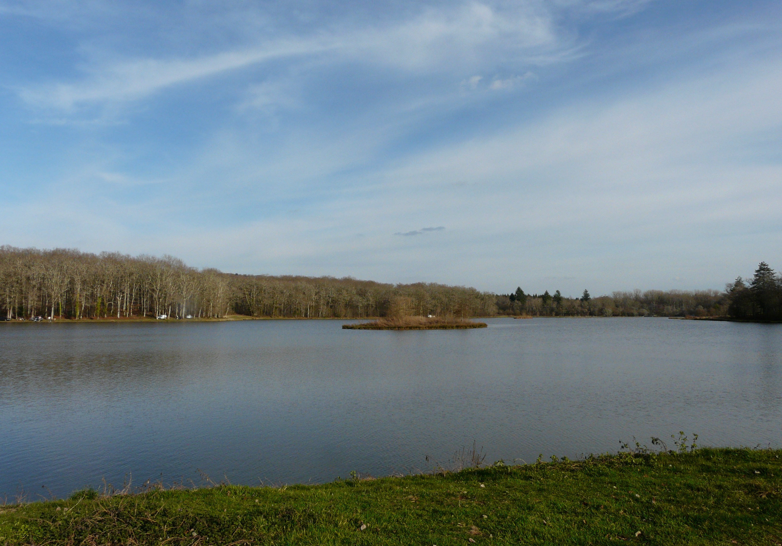 L'étang de Born à Salagnac, Dordogne, France.